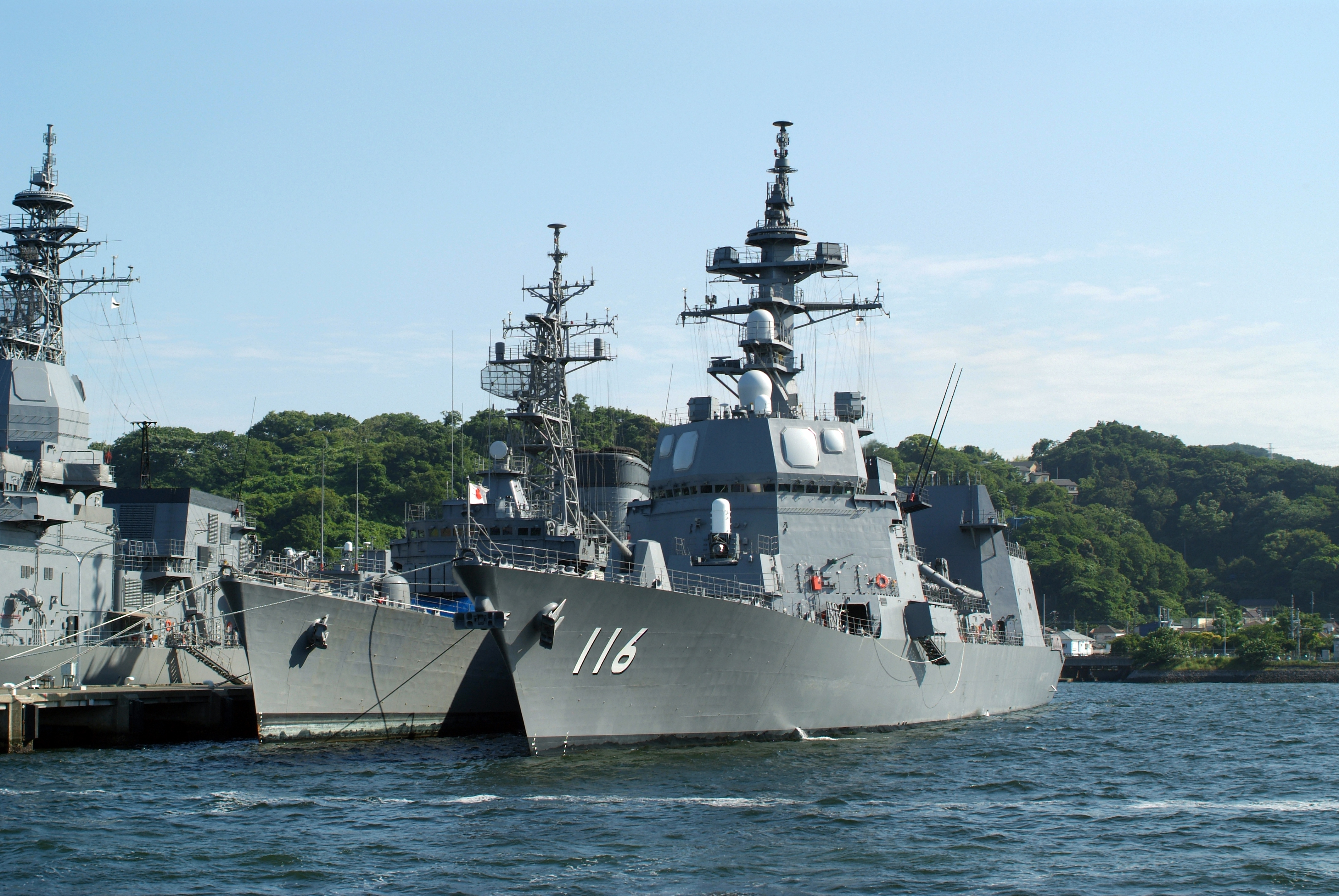 〔右から左へ〕 護衛艦てるづき、除籍後の同さわゆき、桟橋を挟んで試験艦あすか。横須賀・吉倉桟橋Y4・Y3に係留中。